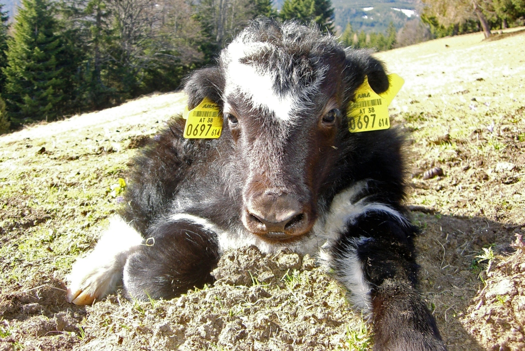 10 Tage altes Yak-Stierkalb. Yakzucht Pongratz ( auf der Koralpe, Steiermark, Österreich.